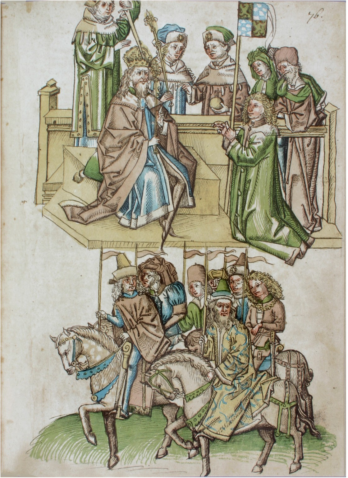 Rosgartenmuseum Konstanz, Hs. 1, Richental: Konzilschronik. In: Feger, Otto (Bearb.): Ulrich Richental: Das Konzil zu Konstanz. Faksimile. Starnberg - Konstanz 1964. Fol. 76r